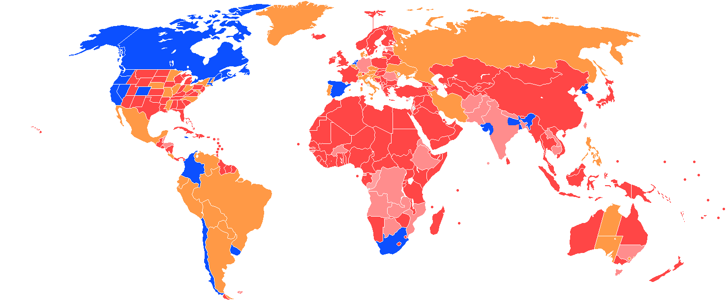 correzione